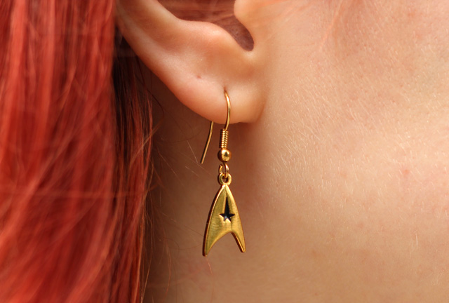 Gold Star Fleet Earrings Model